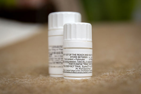 Psilodep, con psilocibina para utilizarse en los ensayos clínicos del Centro Imperial para la Investigación Psicodélica, Imperial Centre London. Fotografía por Thomas Angus, Imperial College London.